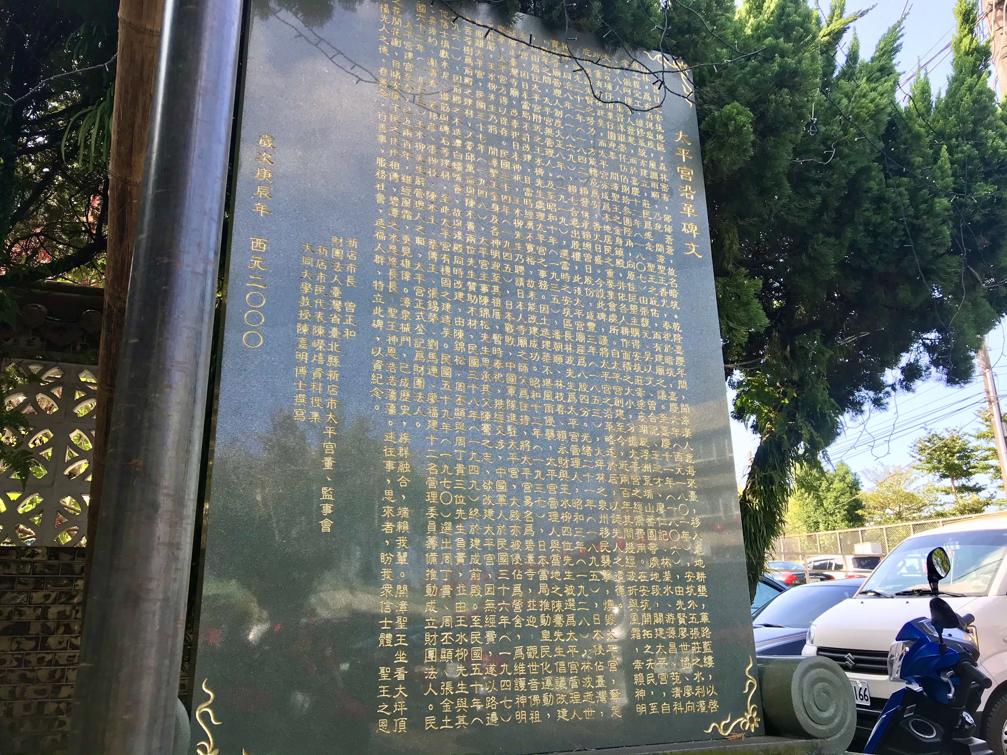 中文（台灣）: 太平宮沿革碑